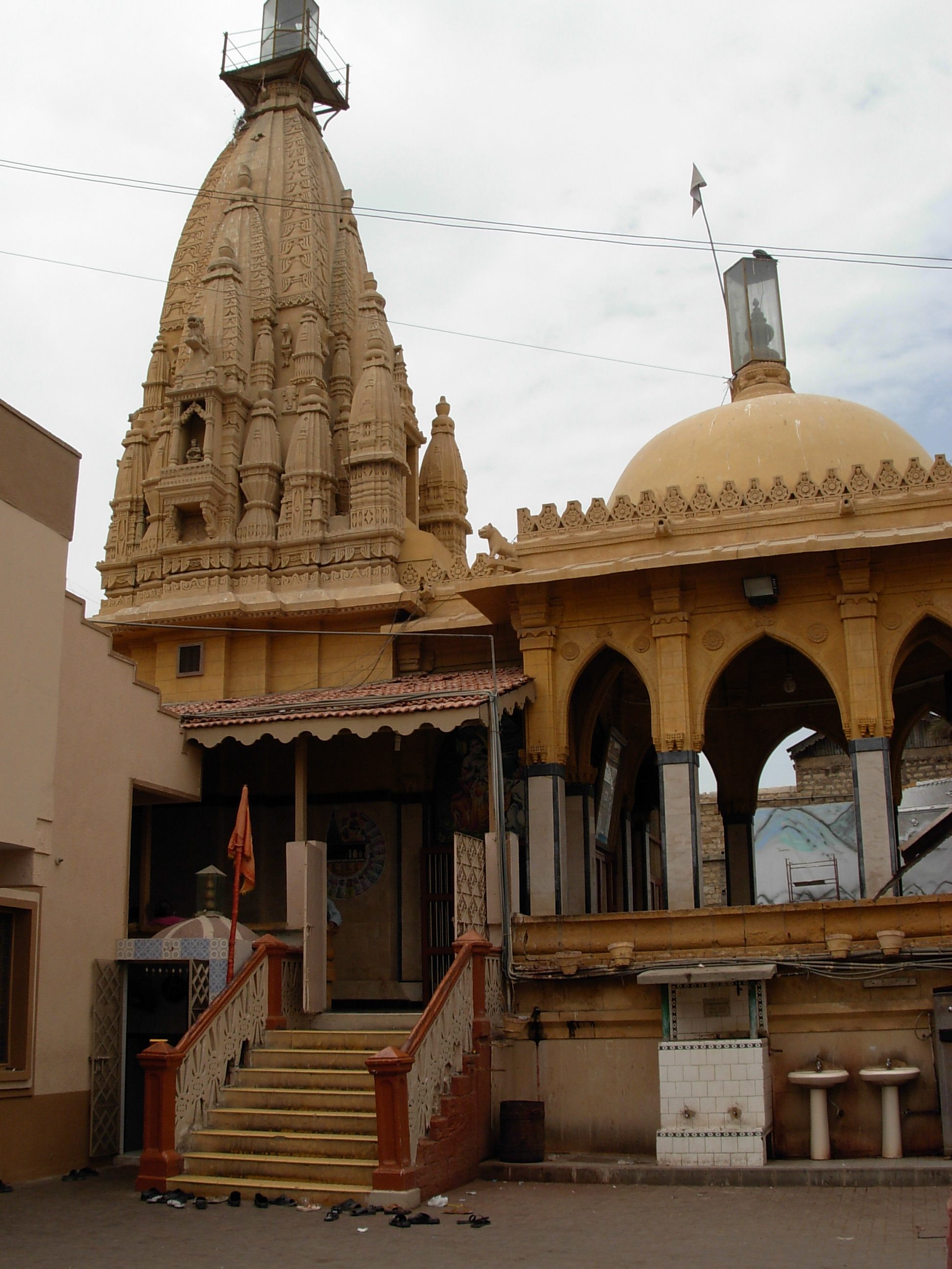 Shri Swaminarayan Mandir, Karachi